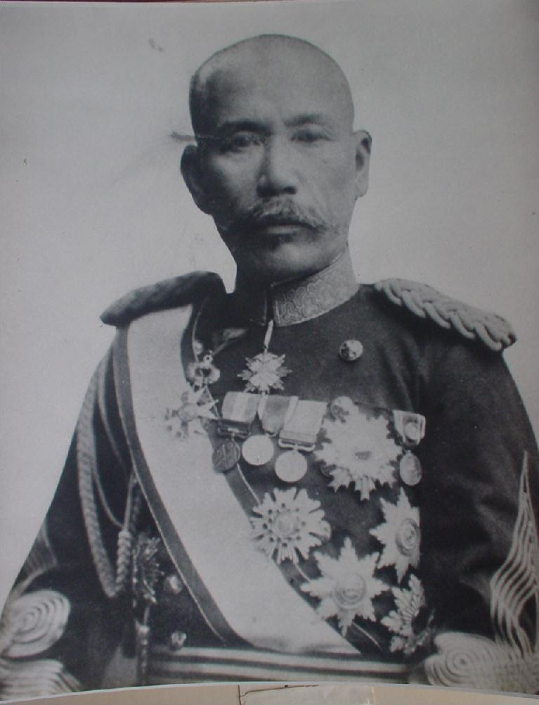 Portrait of Inoue Hikaru (井上光, 1851 – 1908)